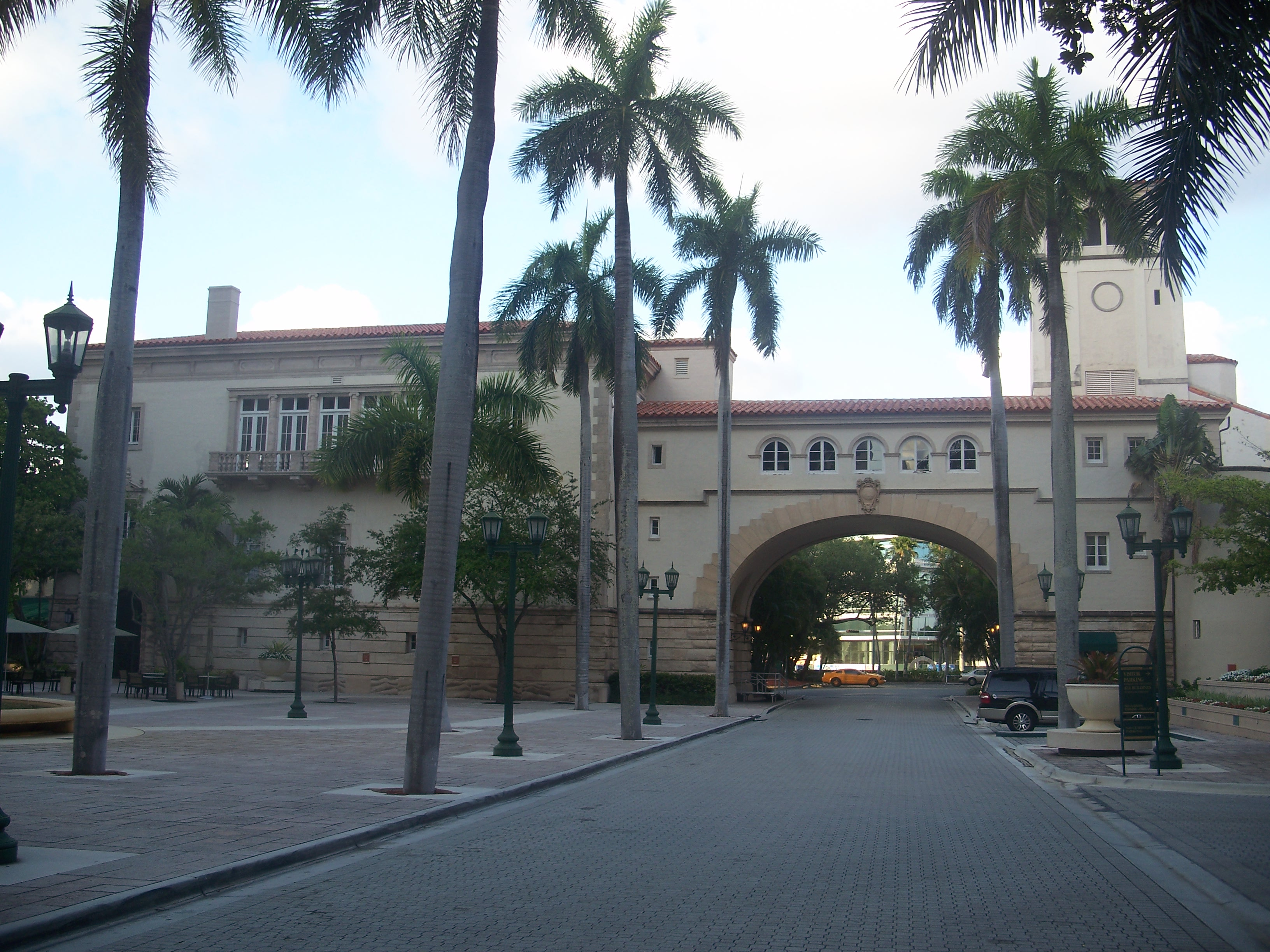 Coral Gables, Florida: Douglas Entrance